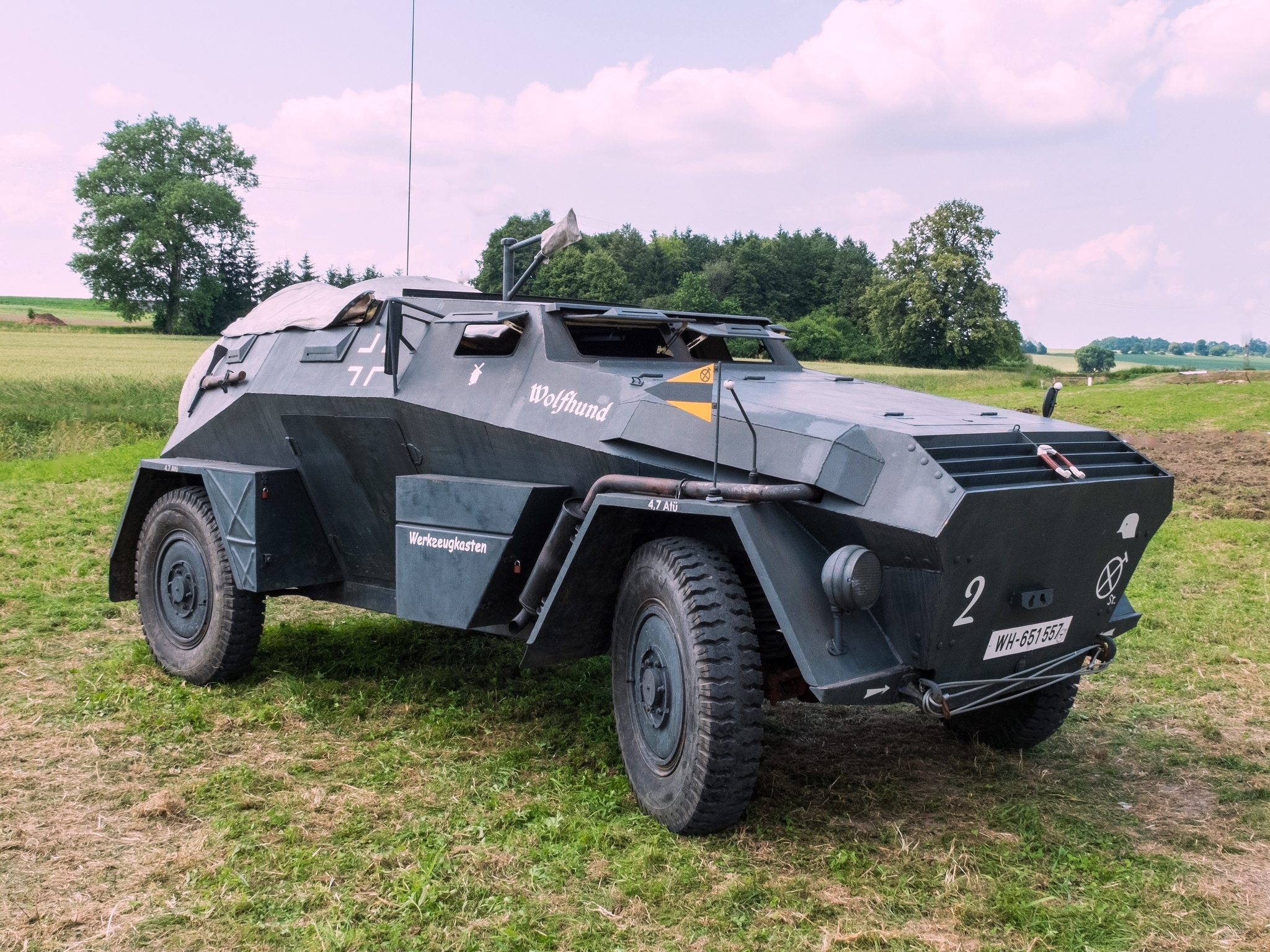 Velitelské vozidlo, používané předevím pro štáb divize. Také se používalo např. k průzkumu.... více na